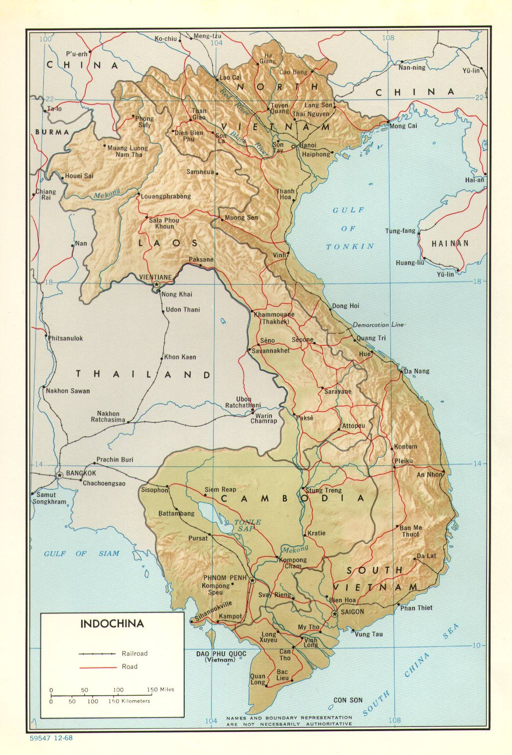 Indochine carte